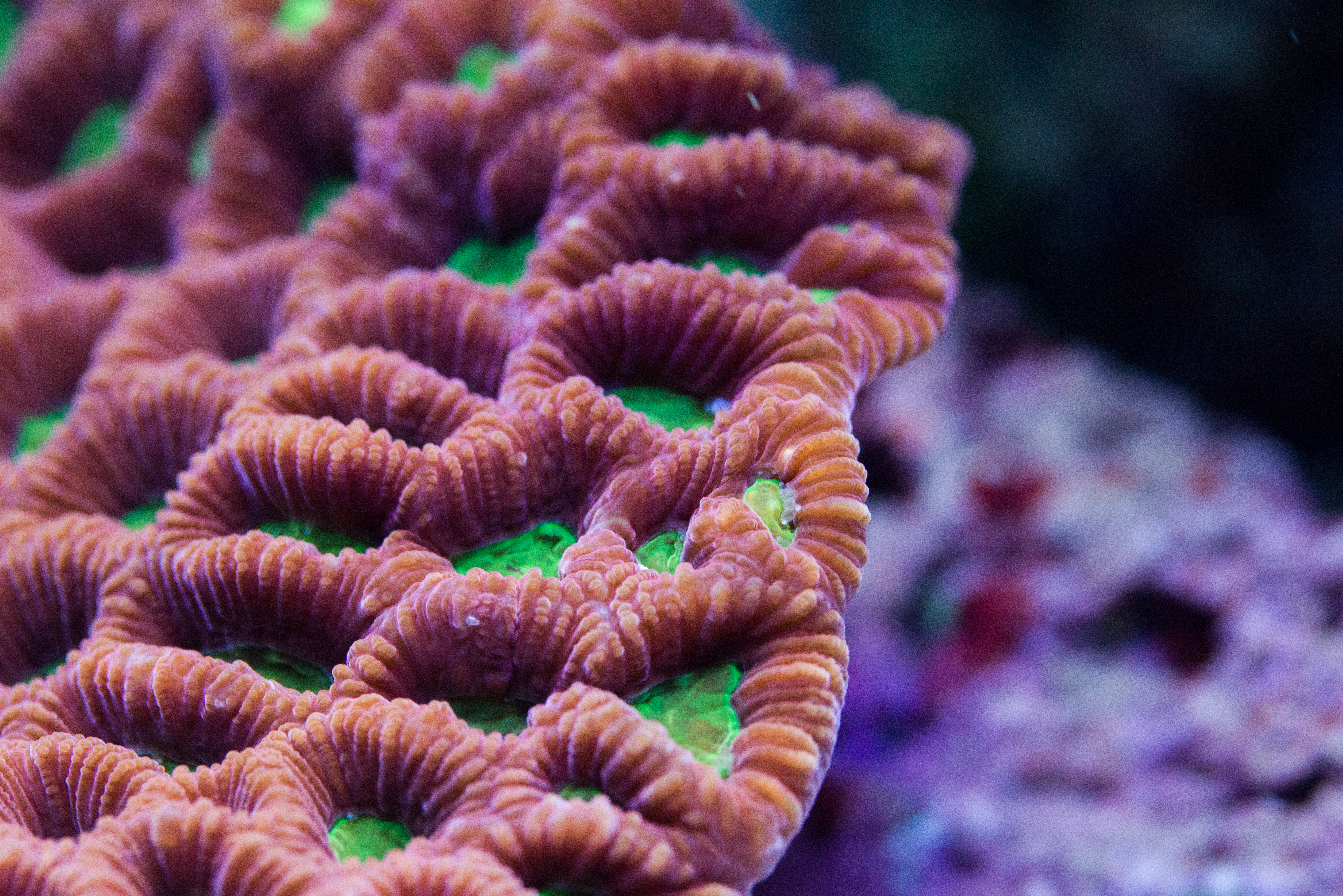 Foto macro de coral Favites sp